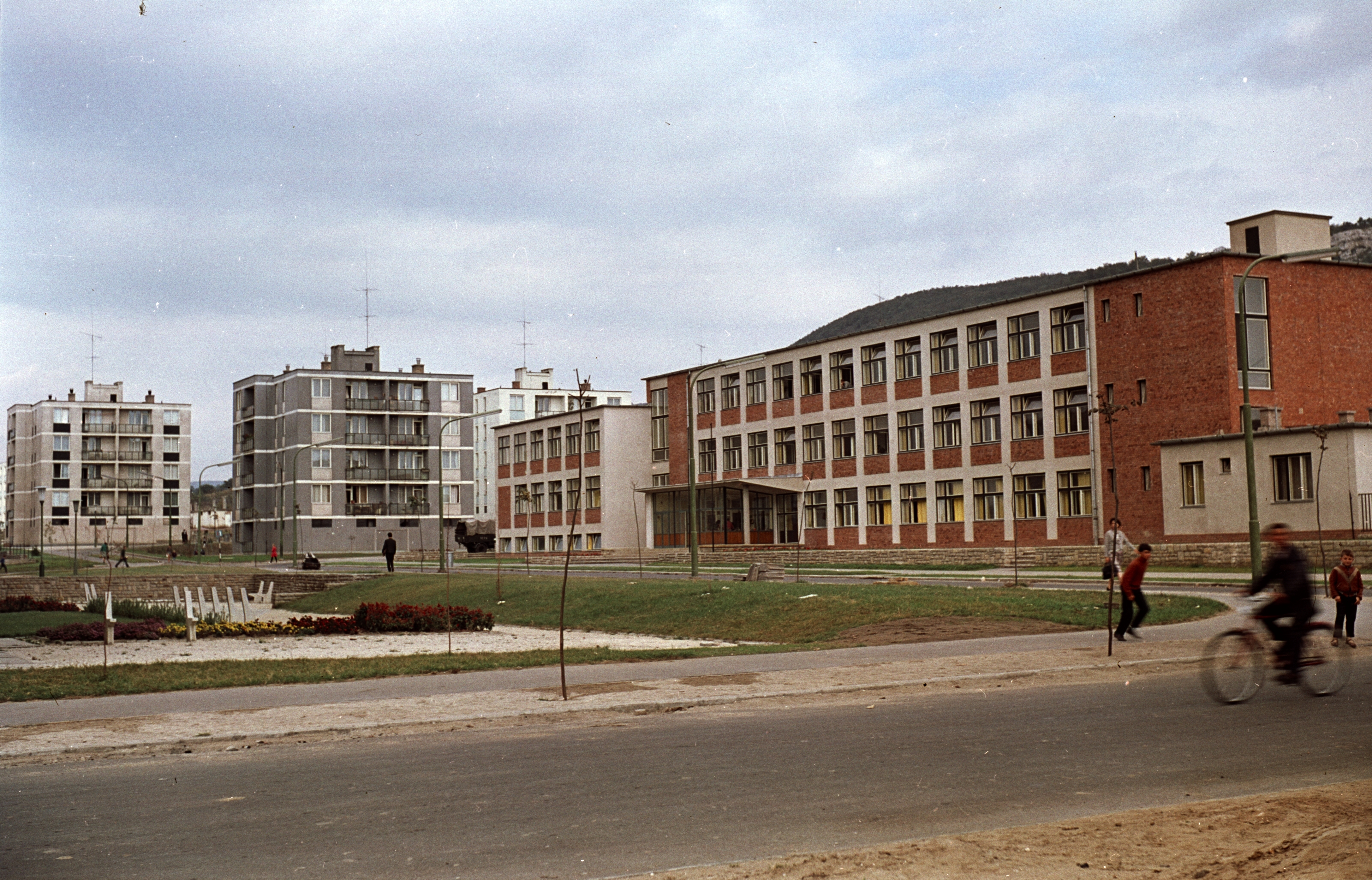 Béla király körút, Arany János Általános Iskola (ma Edutus Főiskola). Location: Hungary Tags: school, colorful, concrete block of flats Title: Béla király körút, Arany János Általános Iskola (ma Edutus Főiskola).